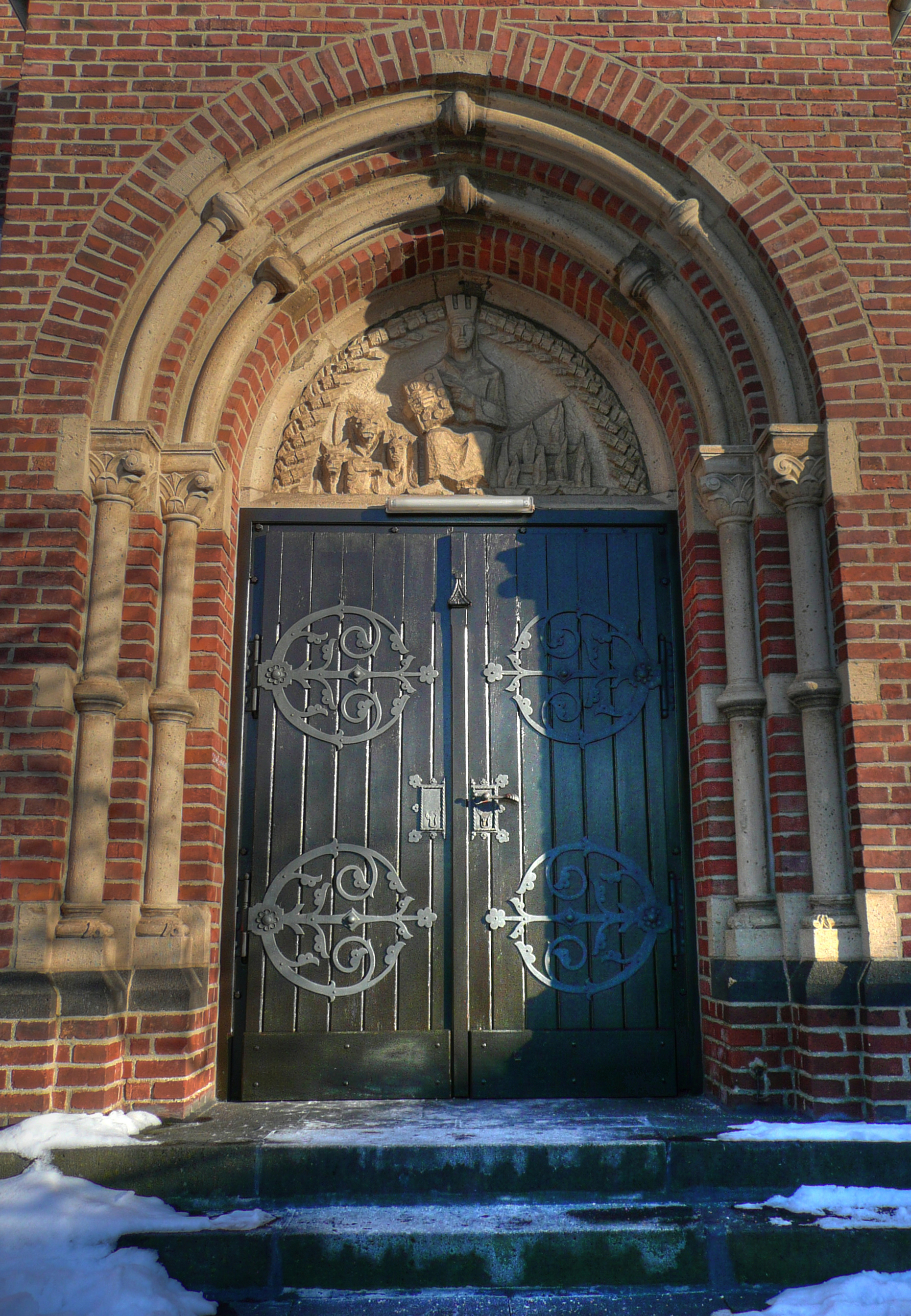 Portal von Groß St. Arnold in Arnoldsweiler